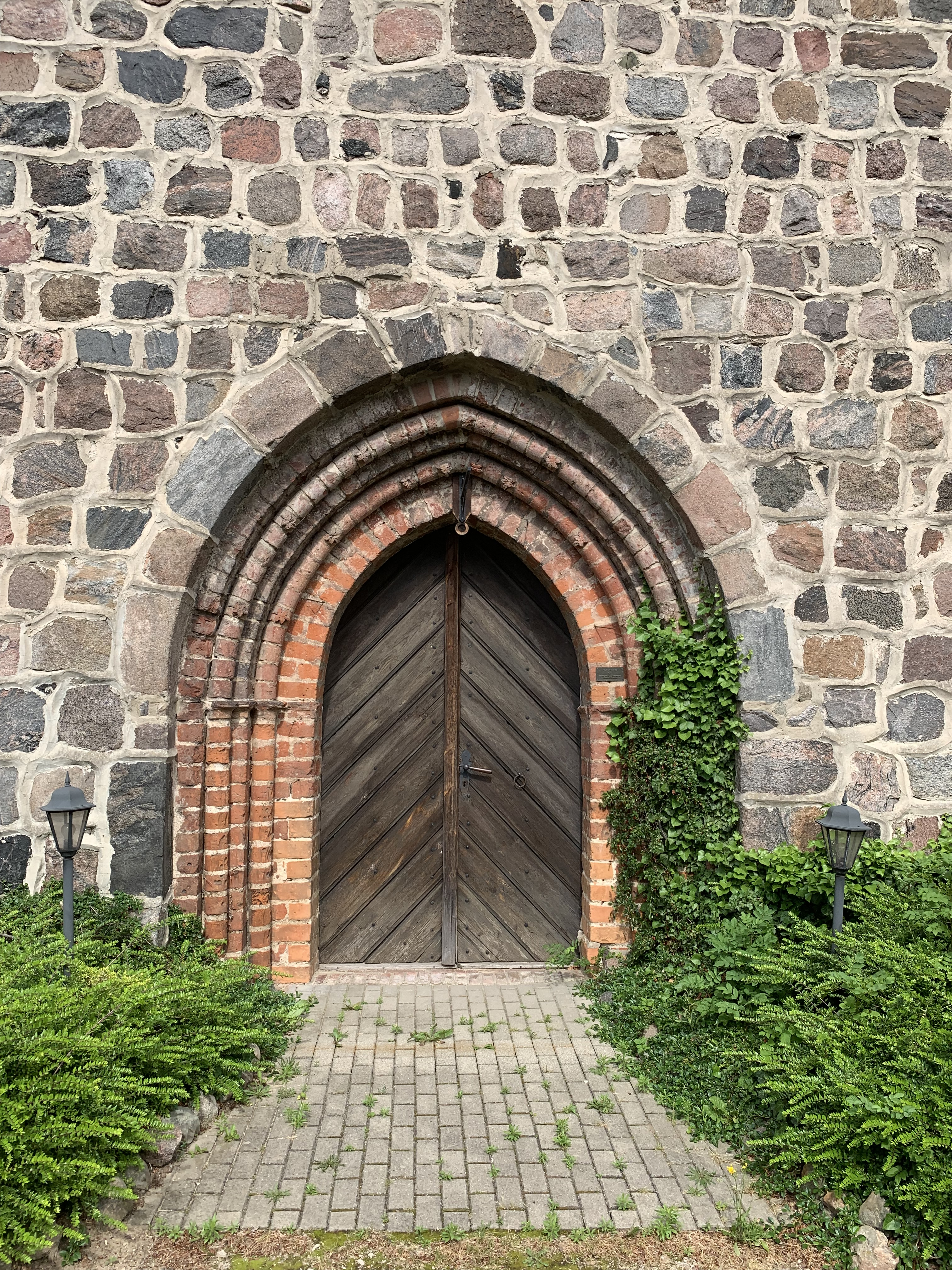 Die Dorfkirche Dabergotz im Landkreis Ostprignitz-Ruppin in Brandenburg ist eine Feldsteinkirche aus der zweiten Hälfte des 13. Jahrhunderts. Im Innern steht unter anderem ein hölzerner Kanzelaltar aus dem Anfang des 18. Jahrhunderts.